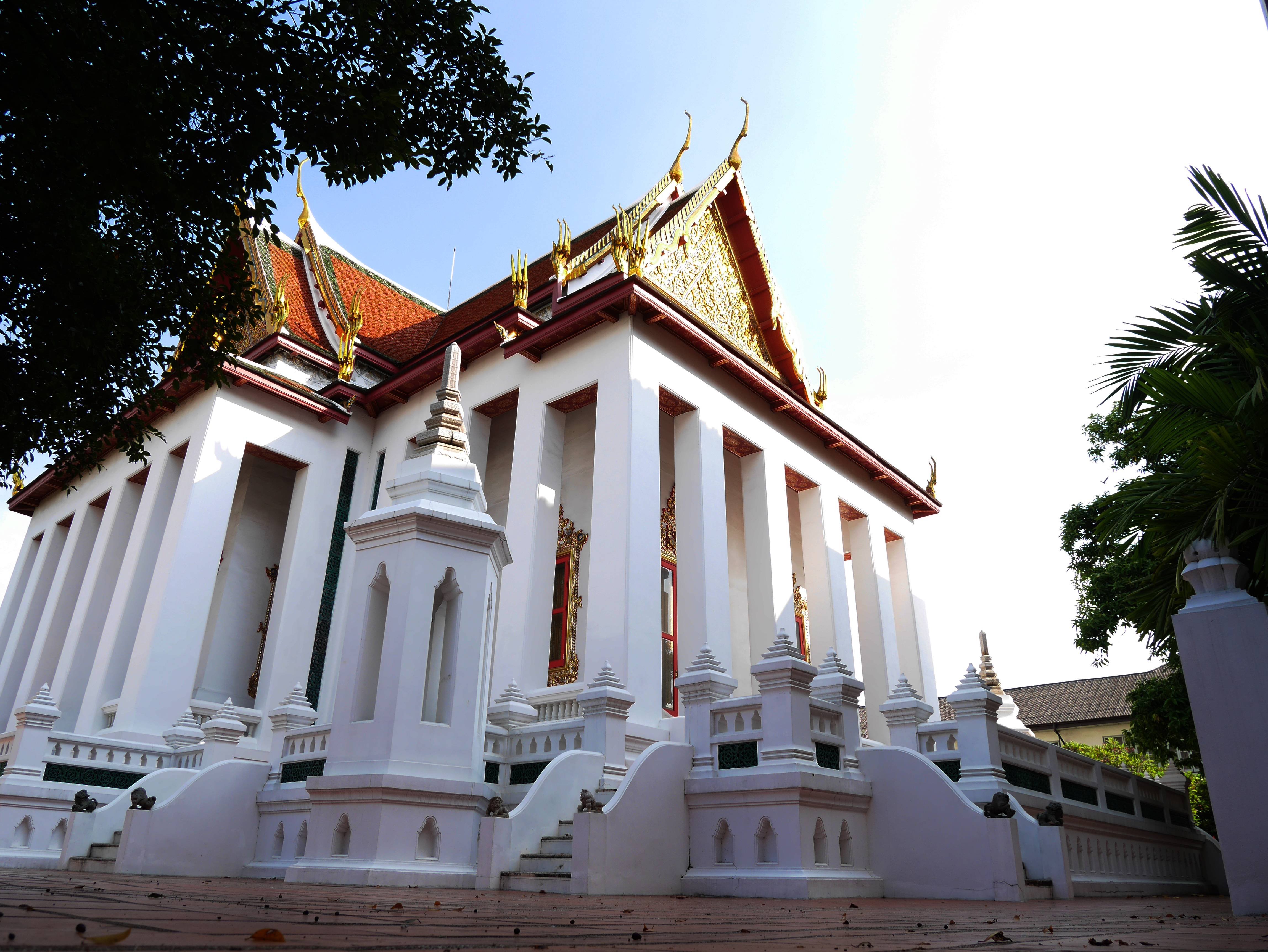 พระราชวังบวรสถานมงคลและกำแพงพระราชวังบวรสถานมงคล(วังหน้า)